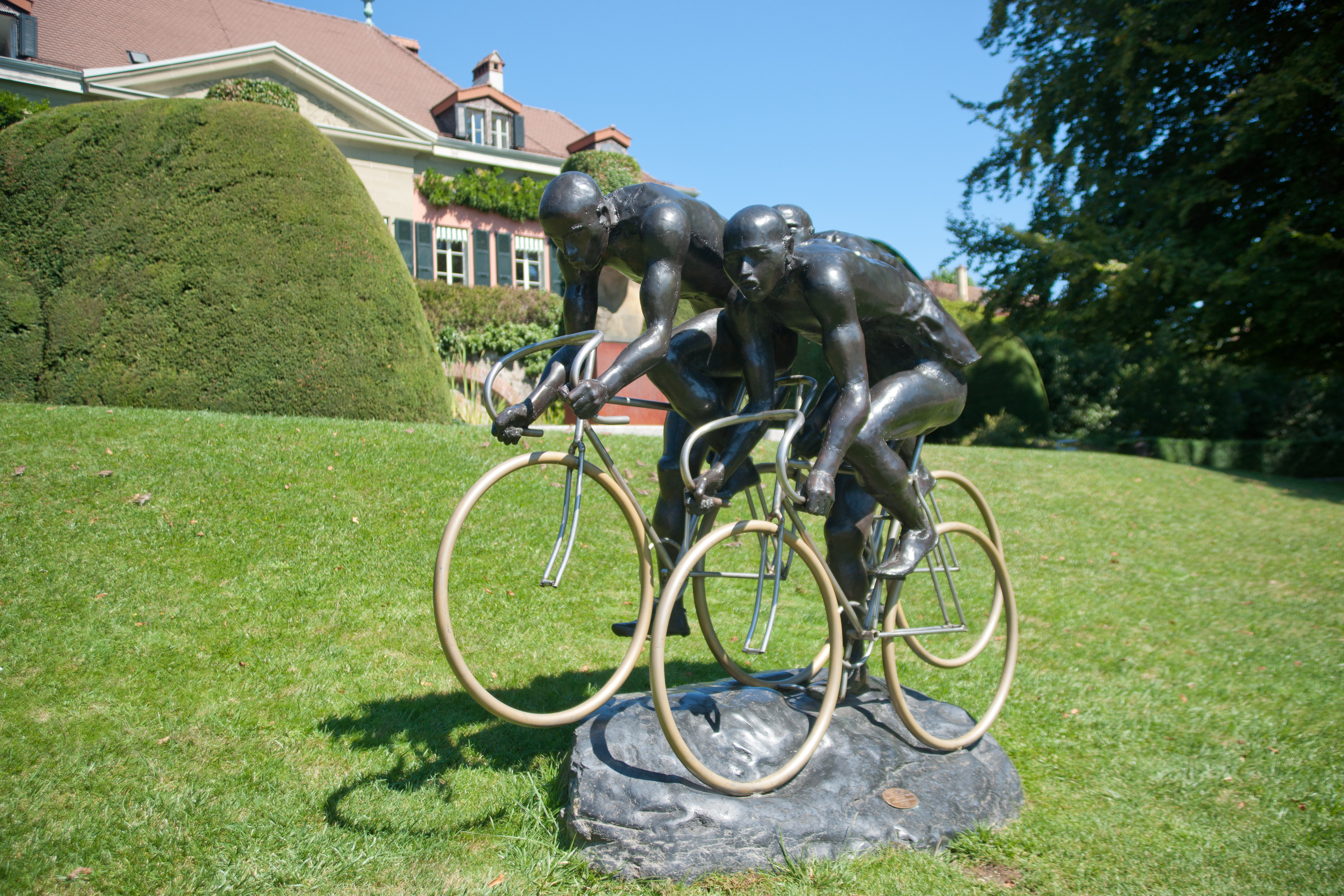 Cyclistes, sculpture de Gabor Mihaly au musée du CIO à Lausanne.